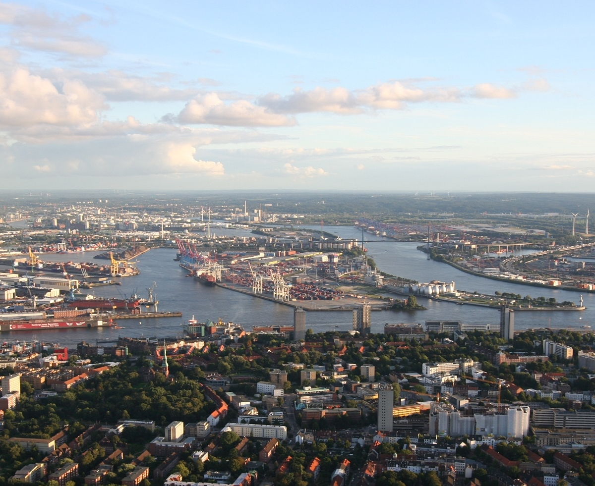 Blick über St. Pauli auf die Elbe und den Köhlbrand-Kanal